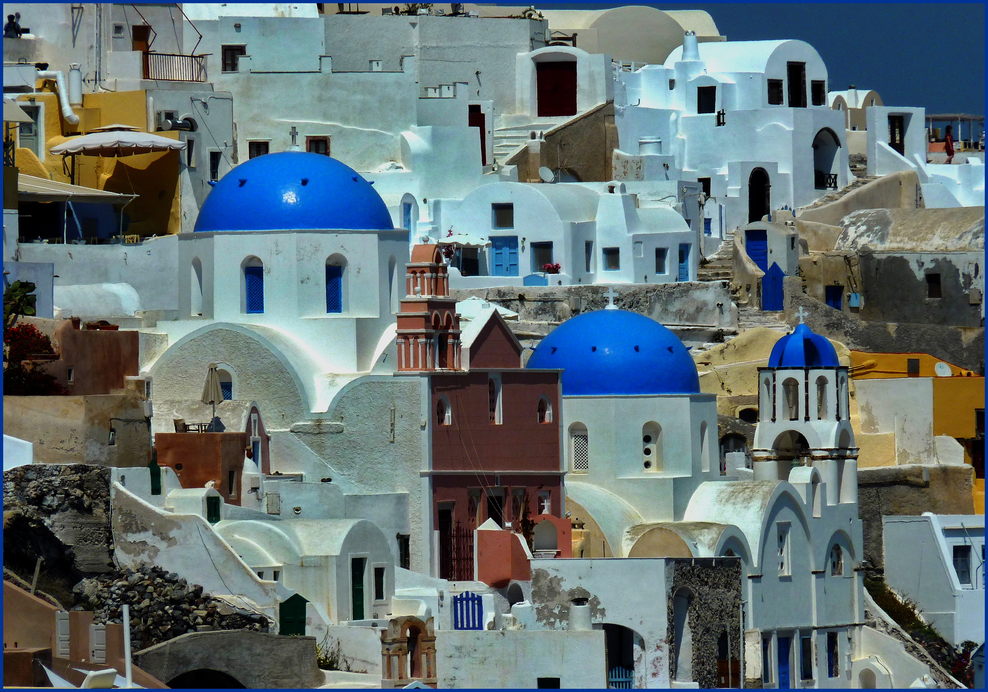 Forme rotonde e colori a Oia